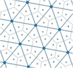 Darstellung zeigt eine Schemaskizze zum System der Zentralen Orte von Walter Christaller Zeichnung erstellt 2003 von Benutzer:Sansculotte. Bild ist unter der GNU FDL zur weiteren Verwendung freigegeben. Quellenangabe und Beleg an erbeten.